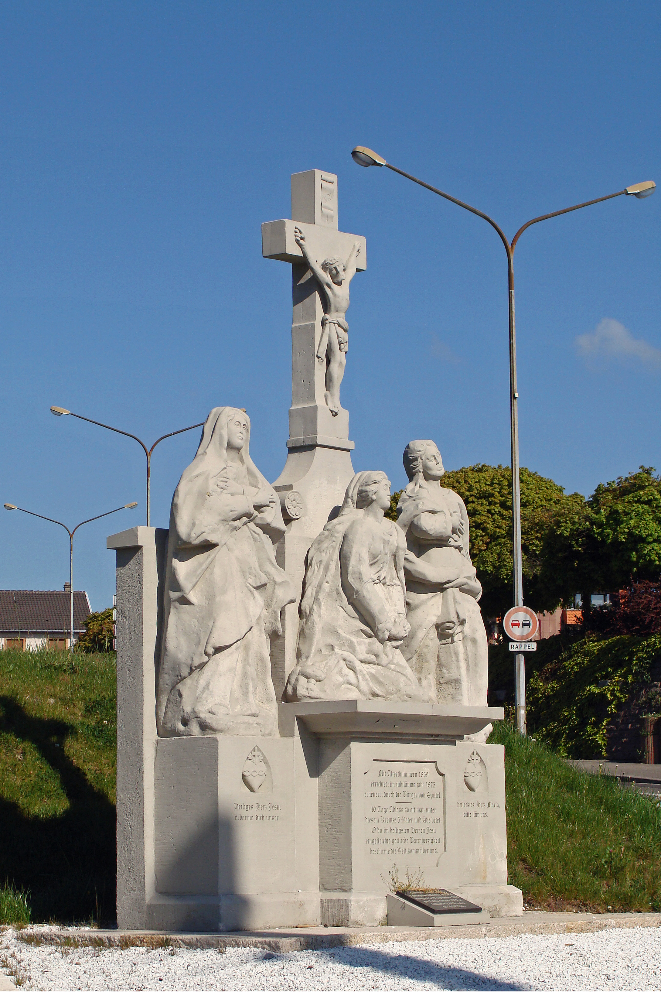 Calvaire du dix-huitième siècle (patrimoine classé) remplaçant un calvaire plus ancien du quinzième avec inscriptions votives diverses, représentant trois personnages (Marie, Sainte Marie-Madeleine et Saint Jean) au pied de la croix, reconstruit en 1859 et rénové en 1875 et déplacé plus tard de la rue du Maréchal Foch, puis en 2012 de la place du Marché à son emplacement actuel rue de la Gare. Il a été complètement restauré et mis en valeur en 2012.